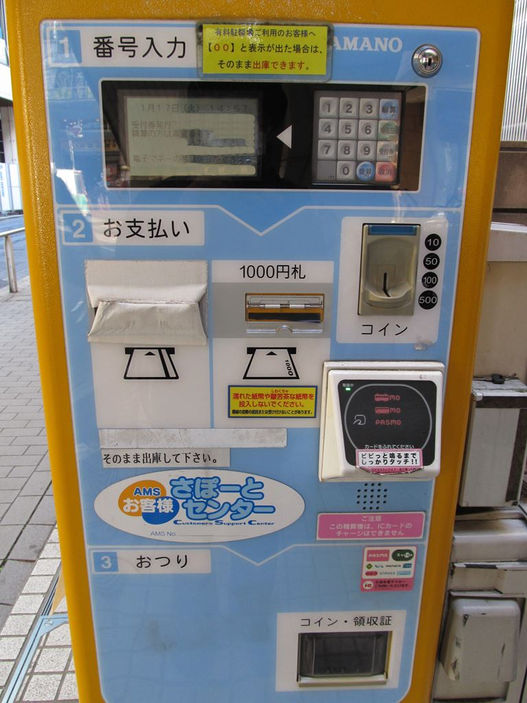 自転車用駐輪場精算機